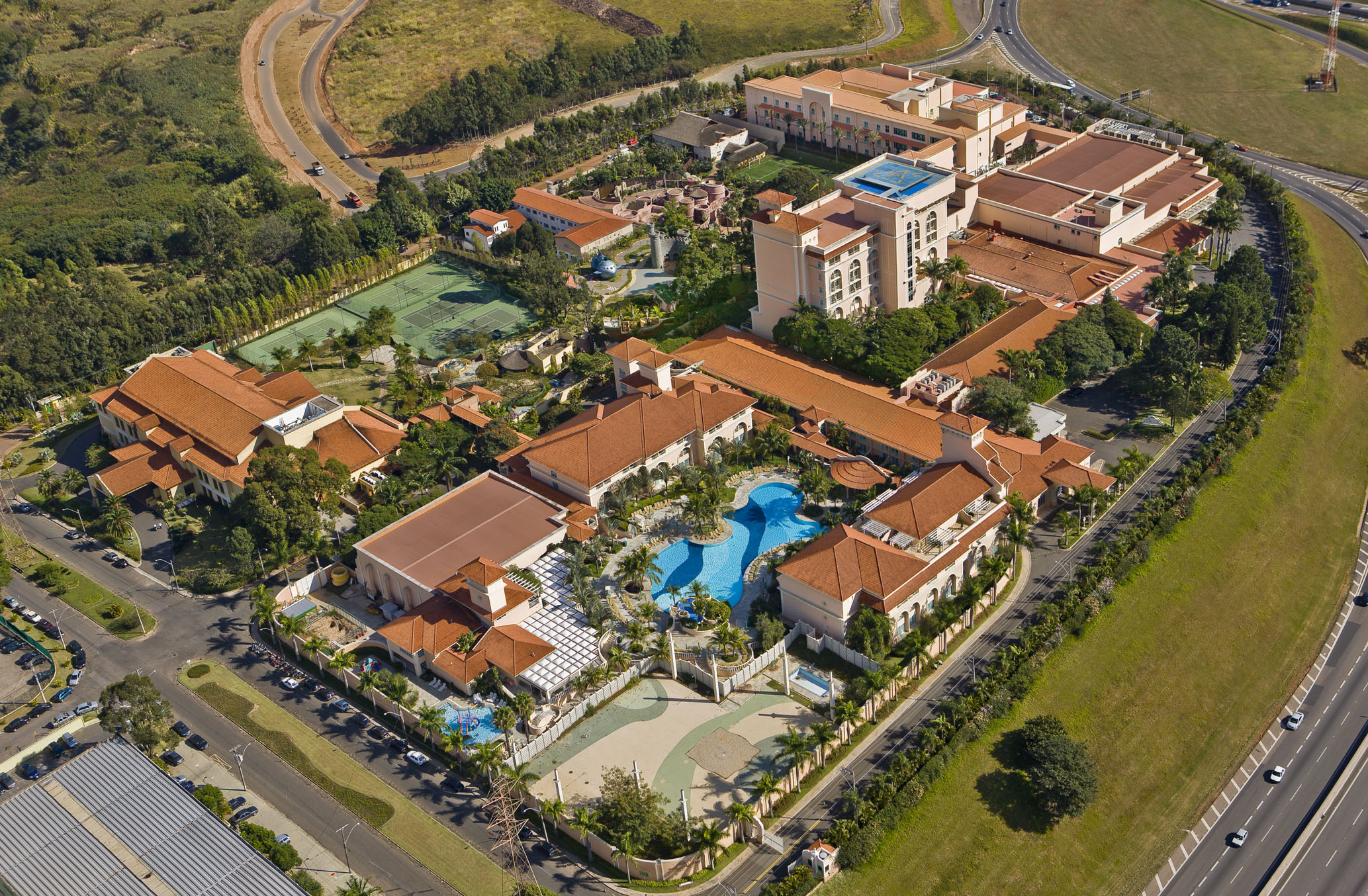 Palma plaza